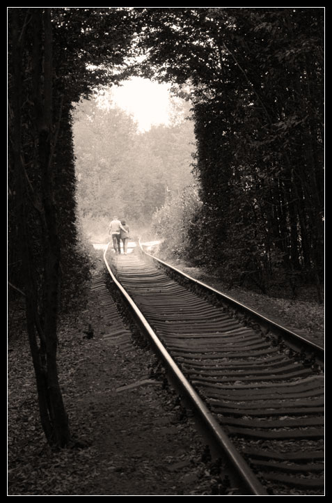 Туннель любви, Ровенская обл.